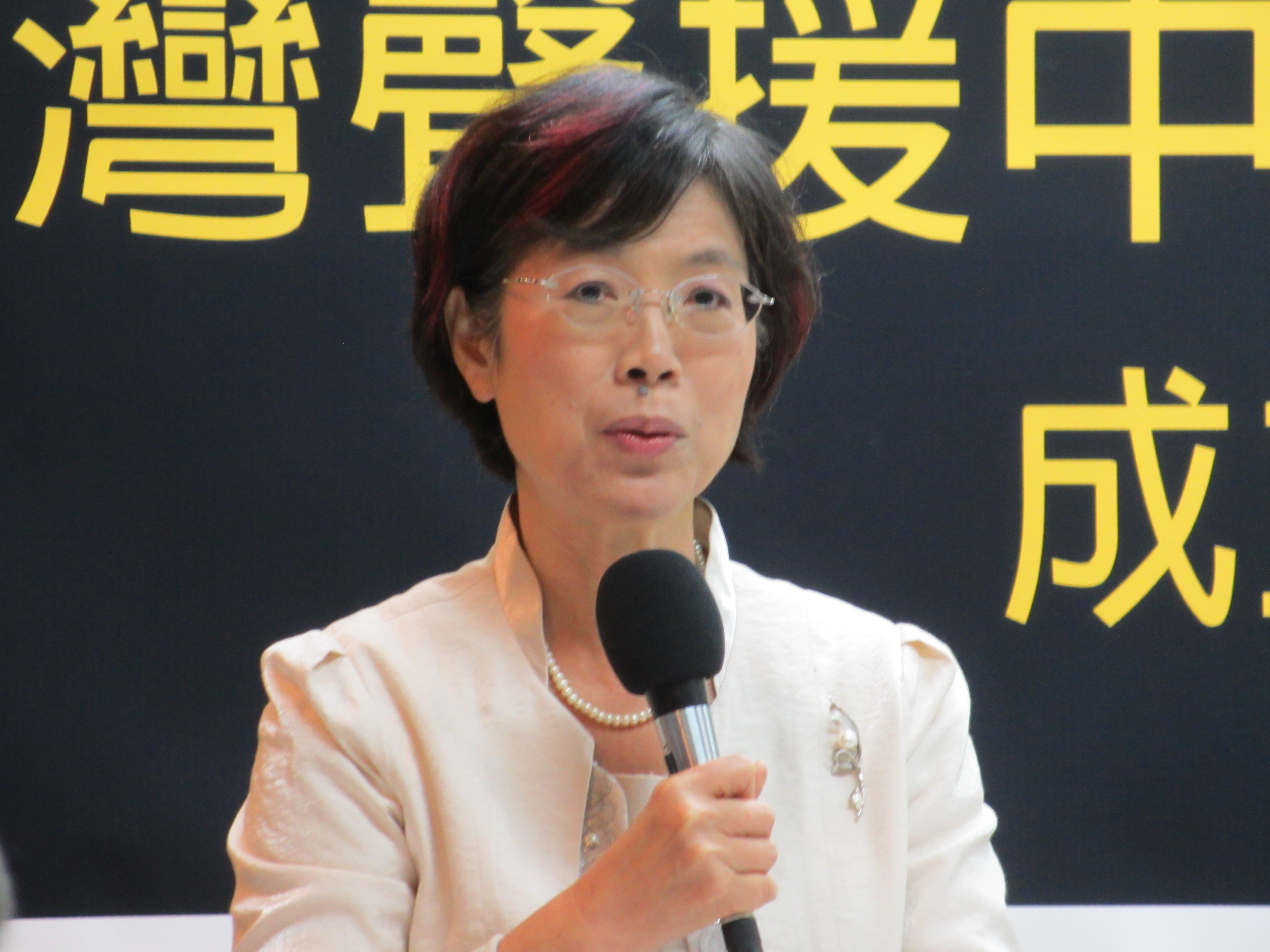 中國政府對於維權律師的迫害越來越嚴重，希望臺灣各界能更加關注中國的人權問題